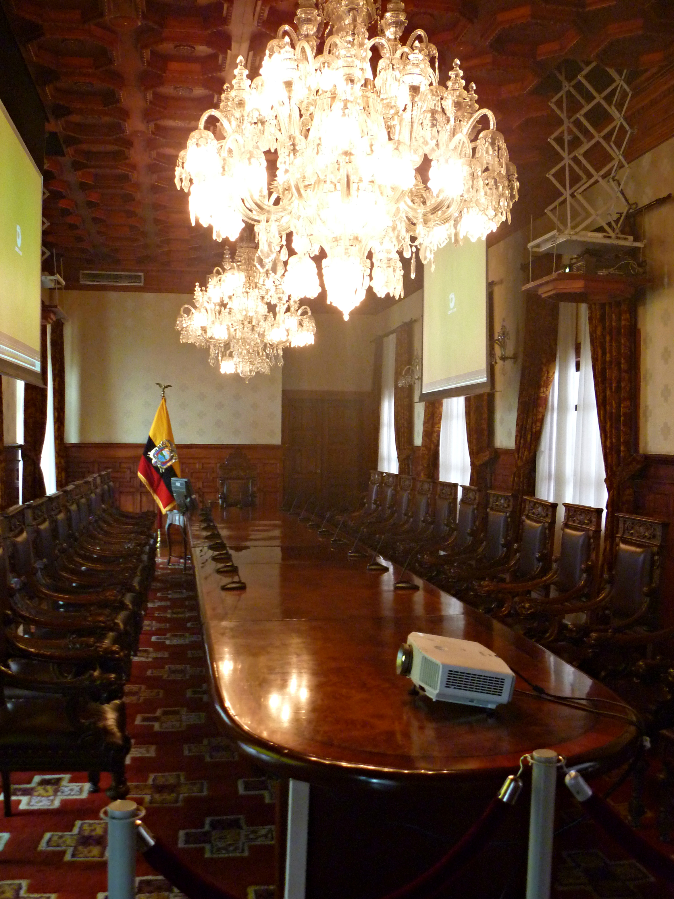 Salón del Gabinete, en el segundo piso del Palacio de Carondelet de Quito. Este espacio es usado por el Presidente de la República para sus reuniones con los Ministros de Estado y Secretarios Públicos.